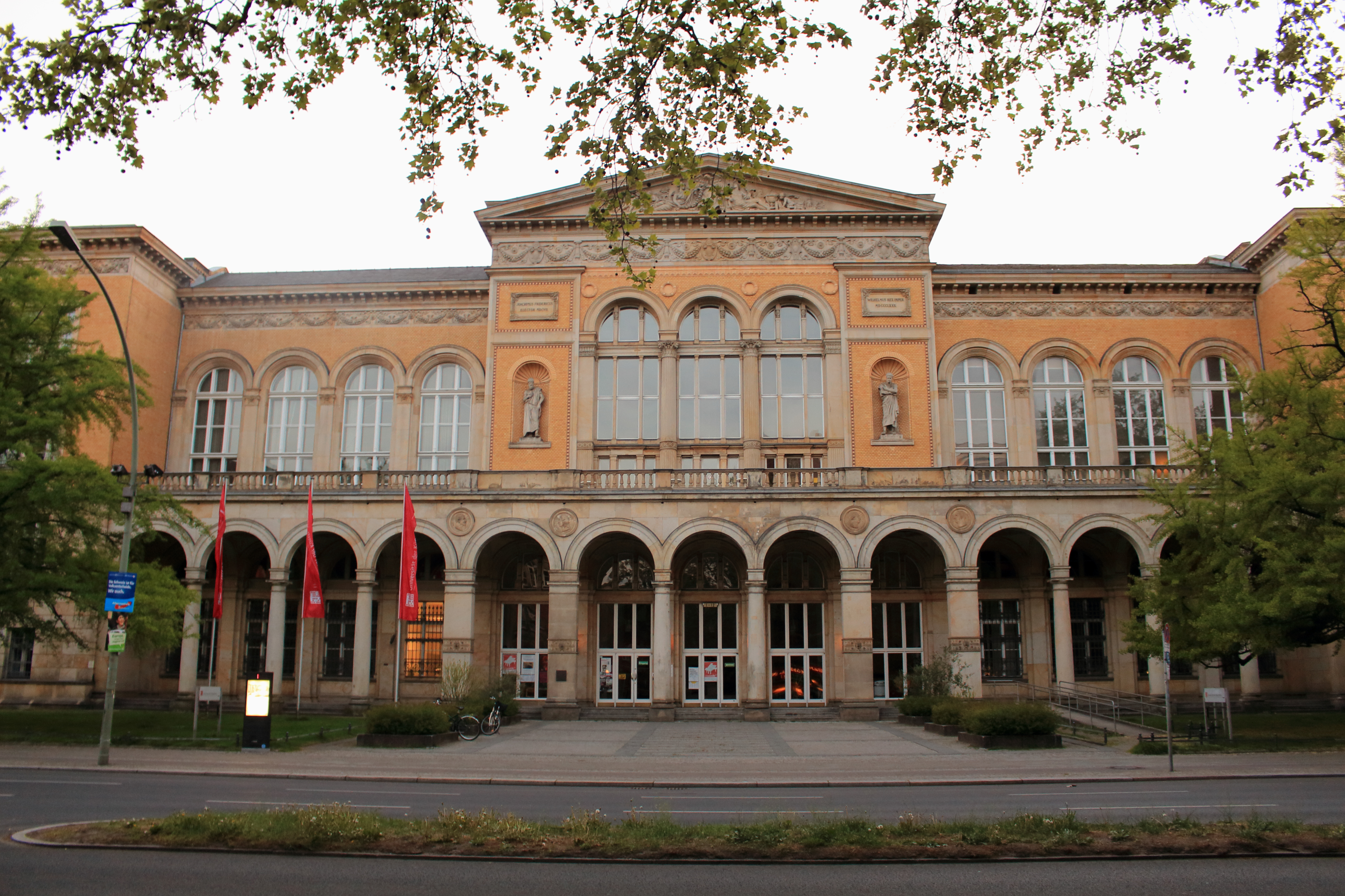 Haupteingang der Fakultät Musik der Universität der Künste